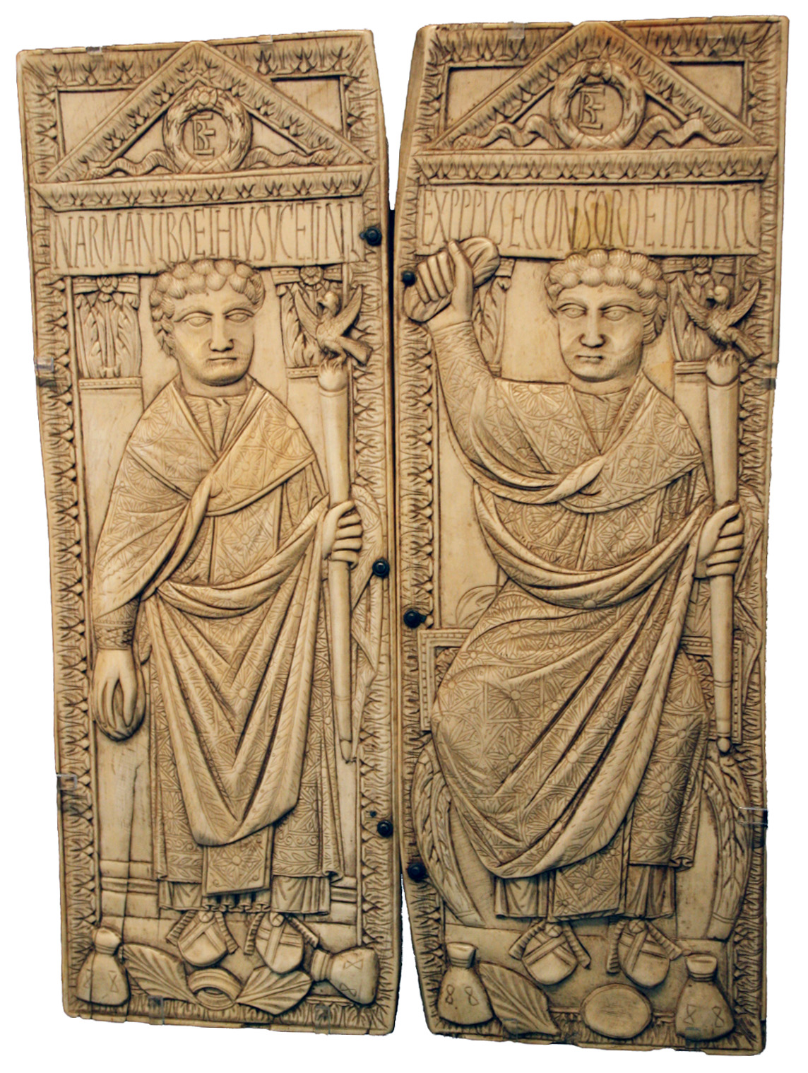 Dittico di boezio (museo di santa giulia, brescia)